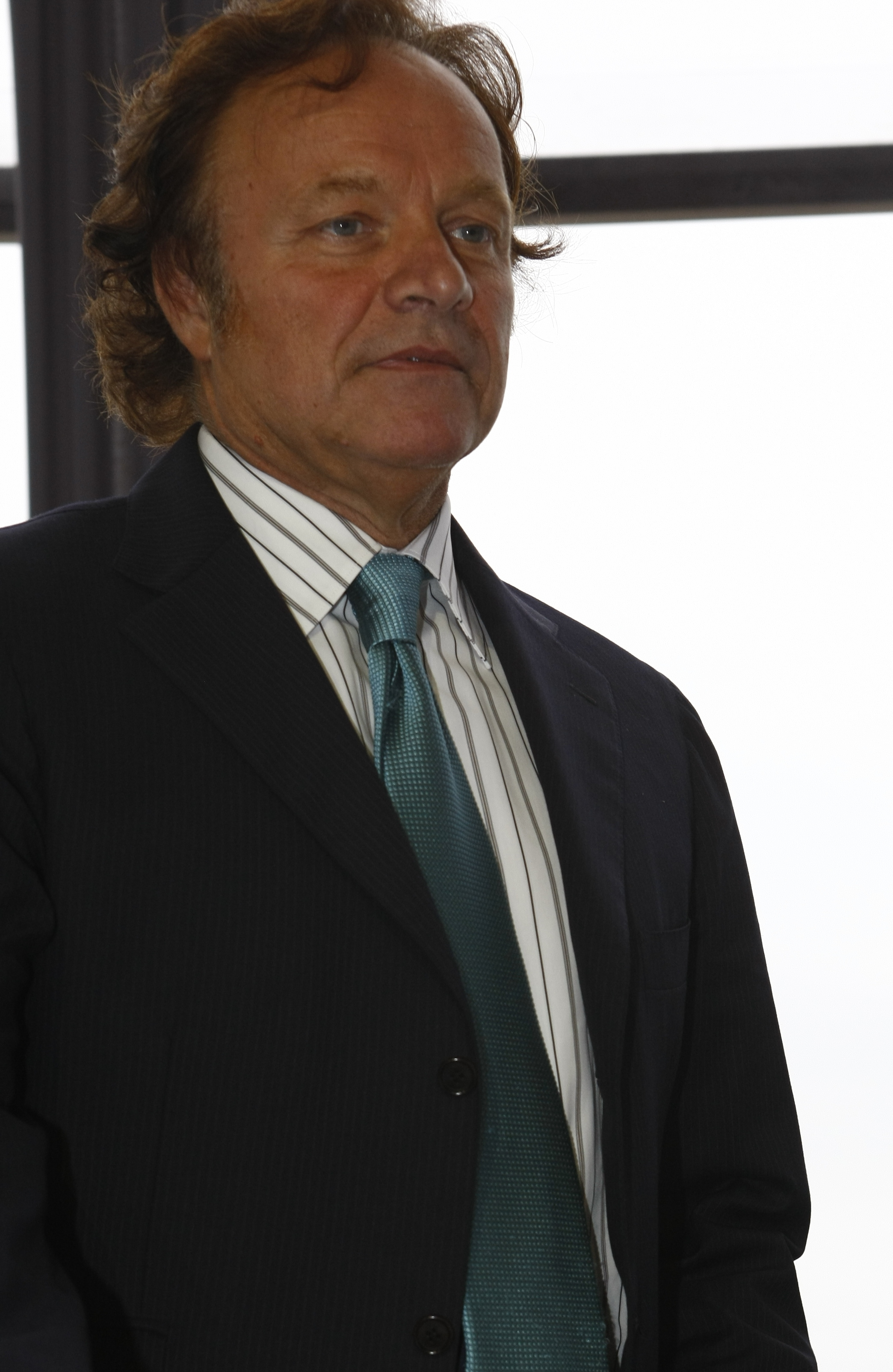 Guillaume Durand, journaliste français.